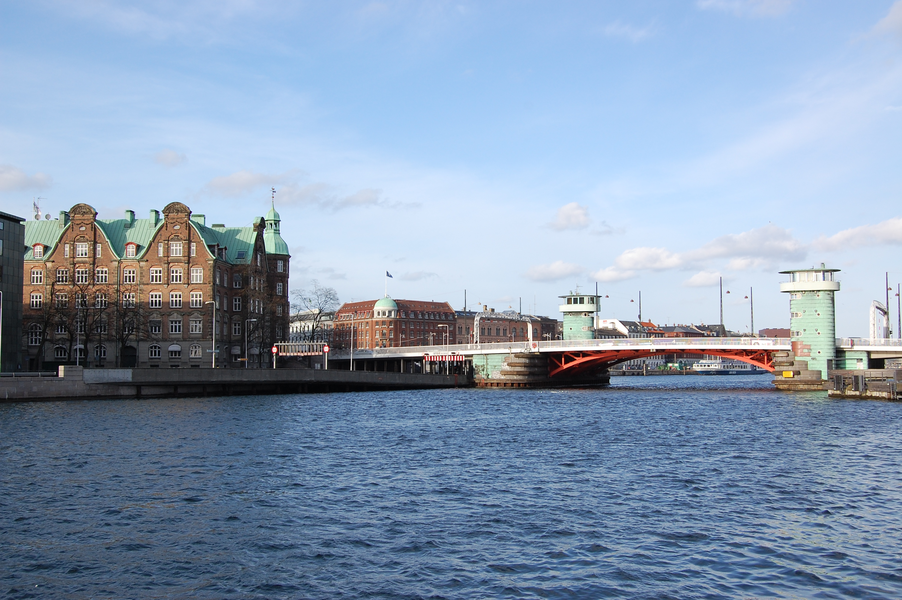 Knippelsbro bridge and C.F. Tietgens Hus in Copenhagen, Denmark